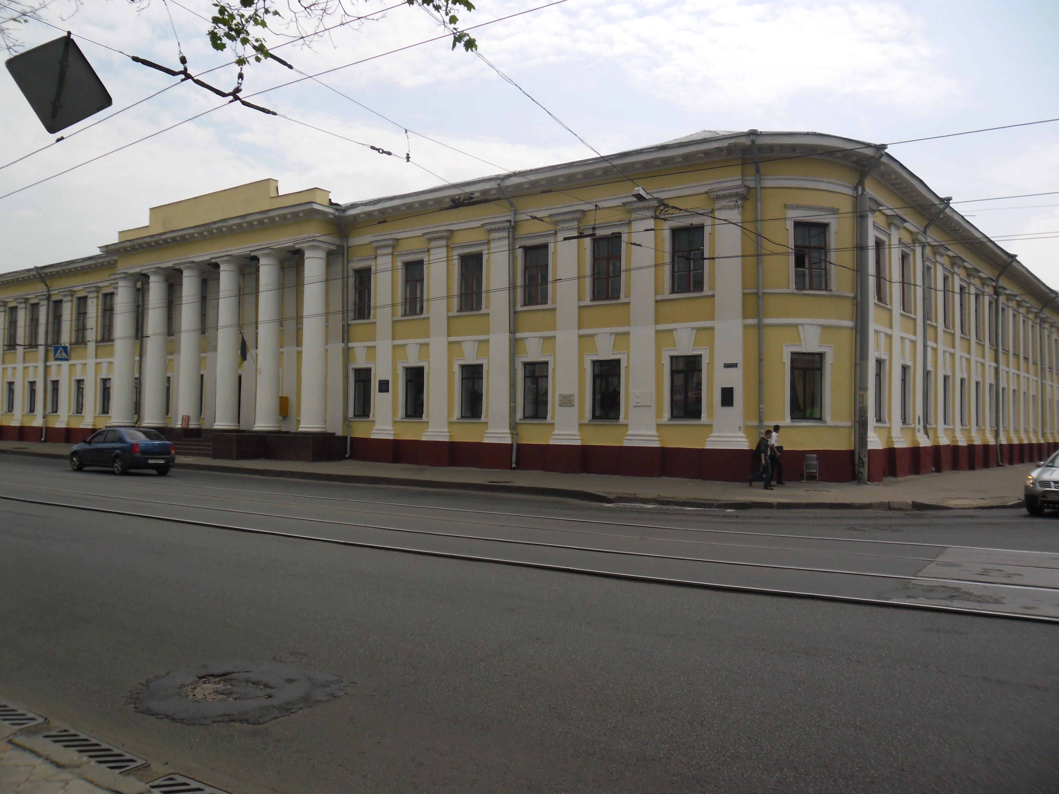 Харків. Московський пр., 24. Будинок 1-ї чоловічої гімназії, тут вчився академік Вернадський В.І.